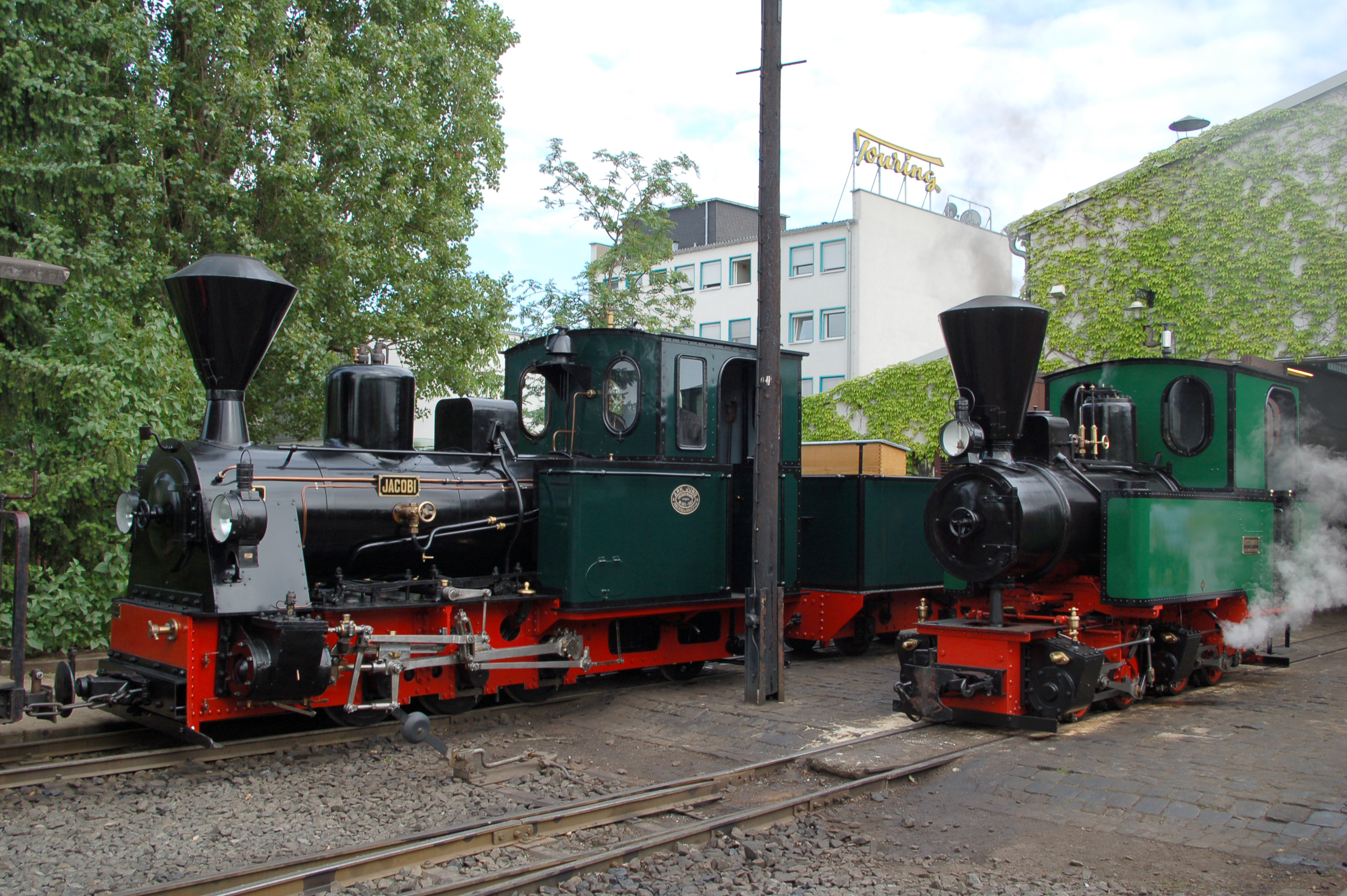 Feldbahnlokomotiven Jacobi 99 3351 und Orenstein & Koppel Mallet